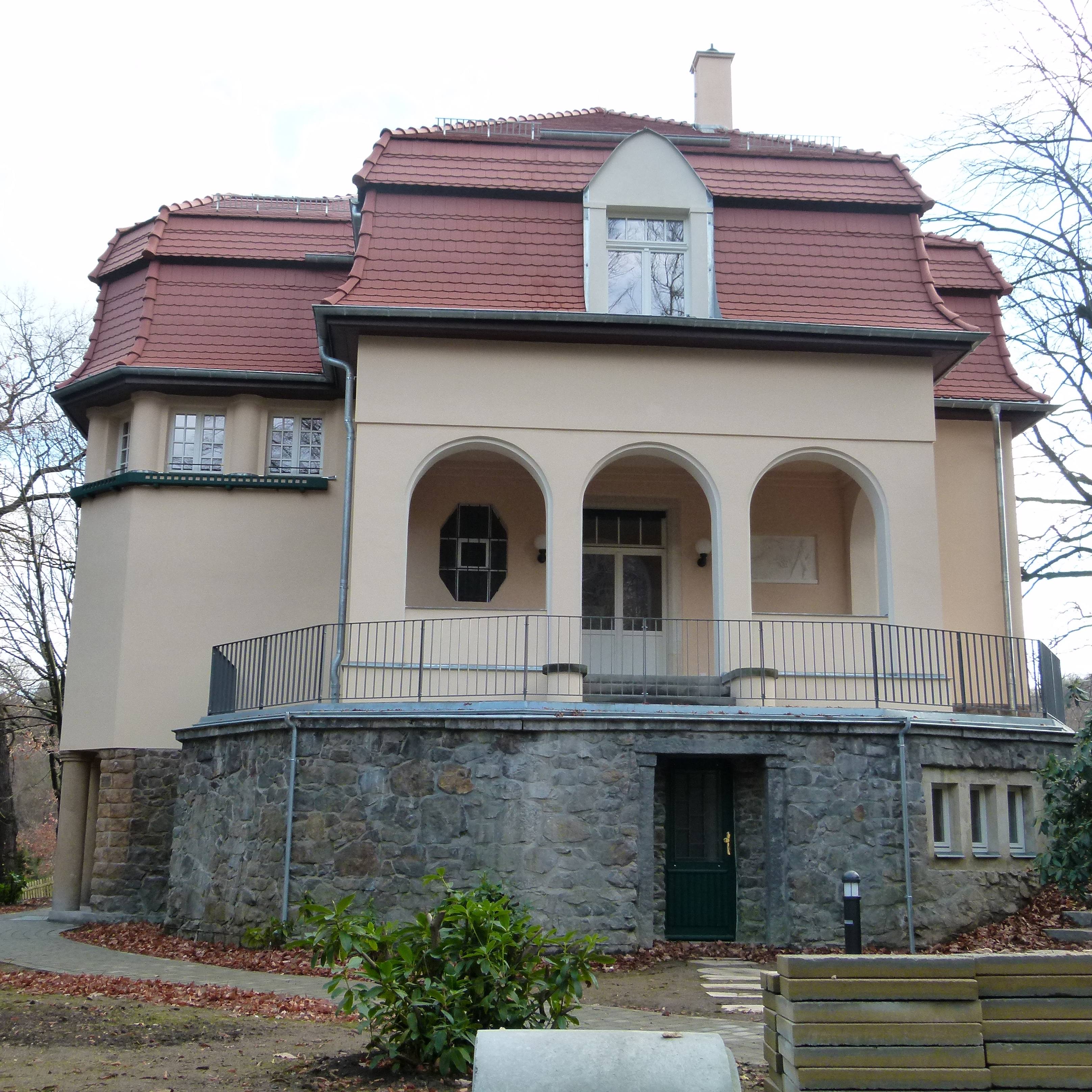 „Villa Rosenhügel“ in Dresden-Loschwitz, Sonnenleite 3, erbaut 1908–1909 durch den Architekten Rudolf Kolbe